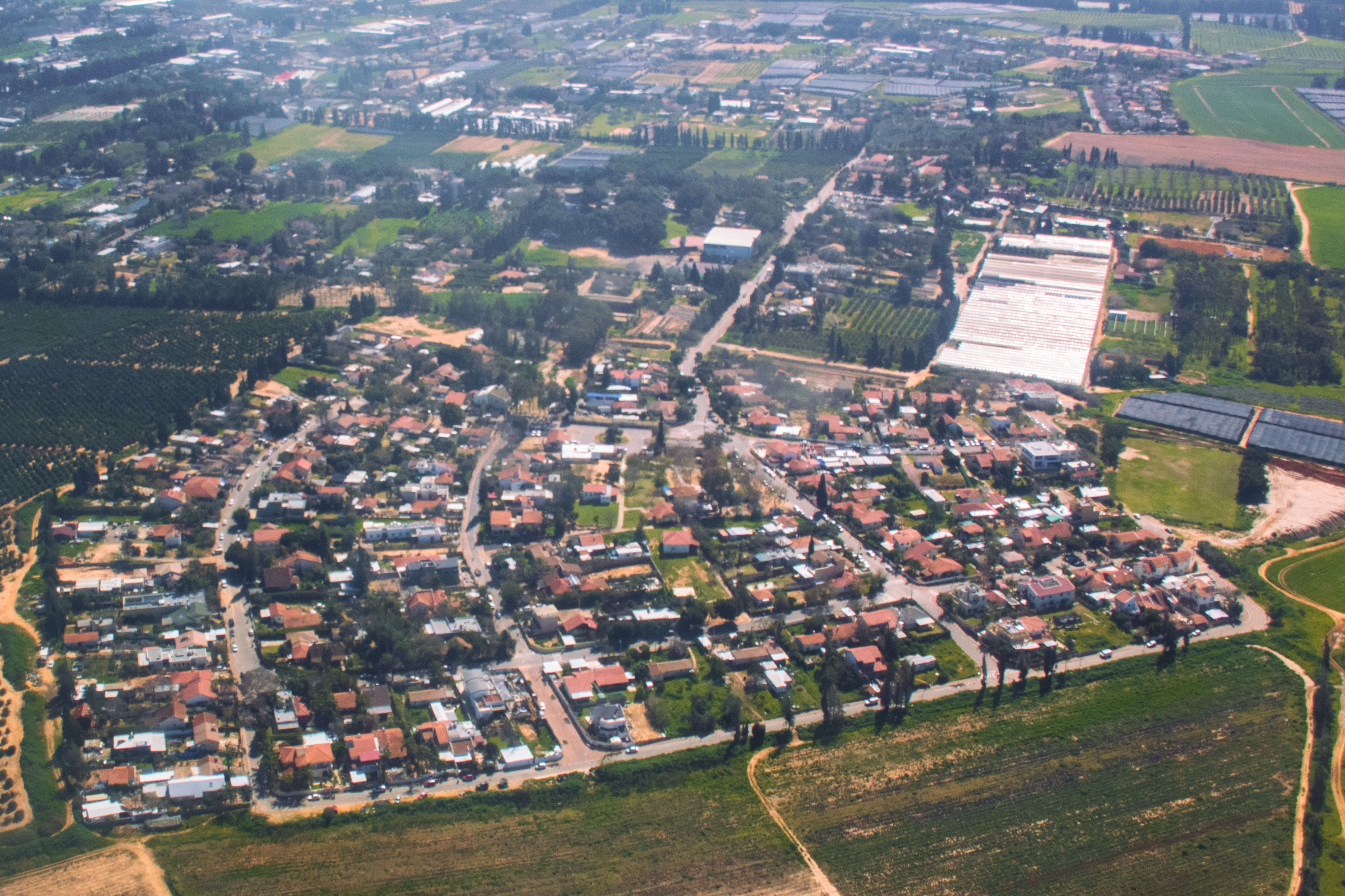 הישוב חרוצים